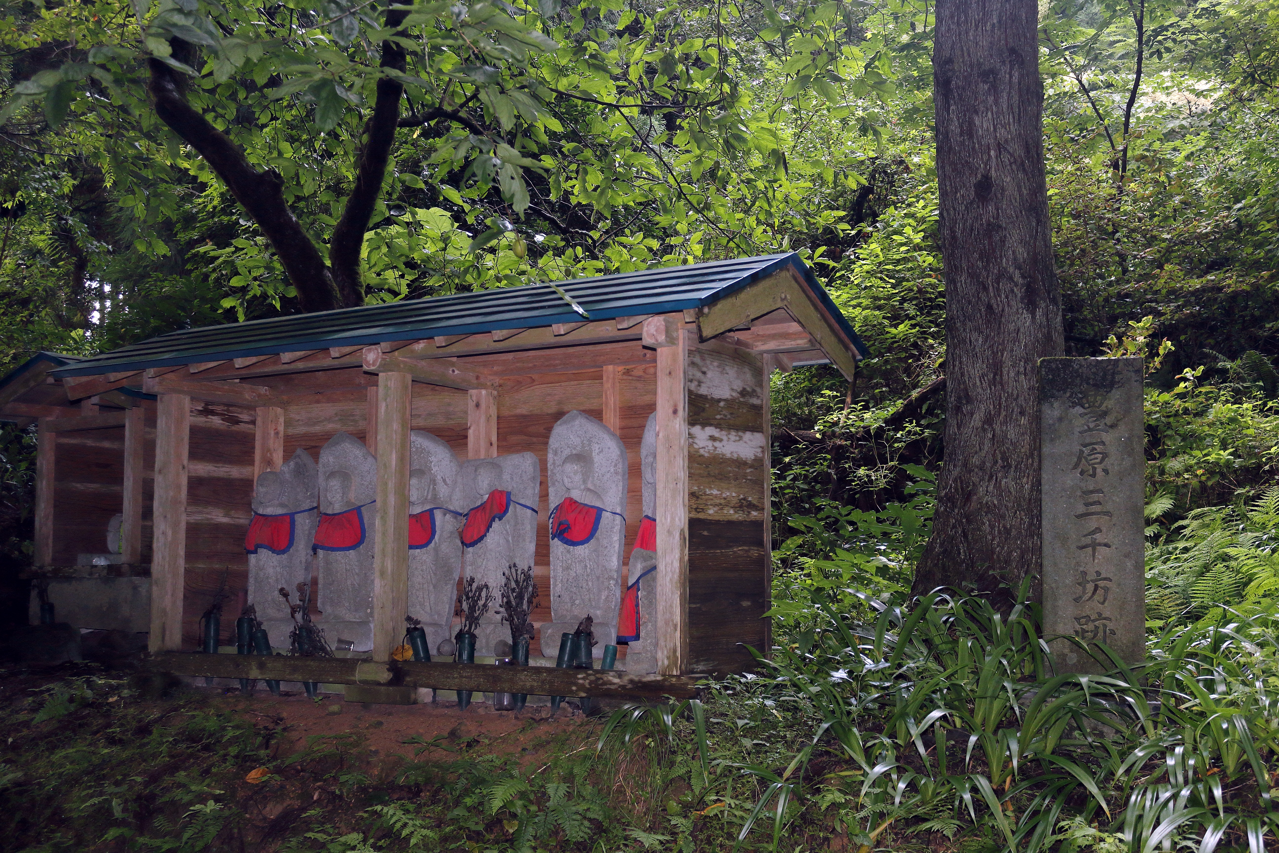 豊原三千坊跡の標柱